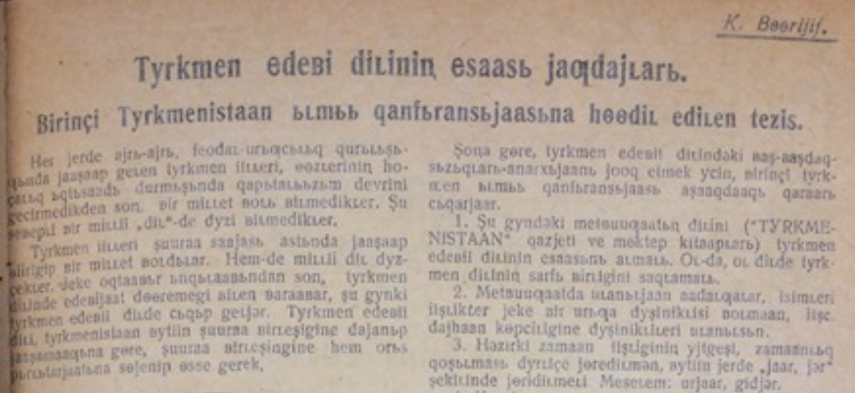 Uniform Türk Alfabesi ile Türkmence bir metin örneği.